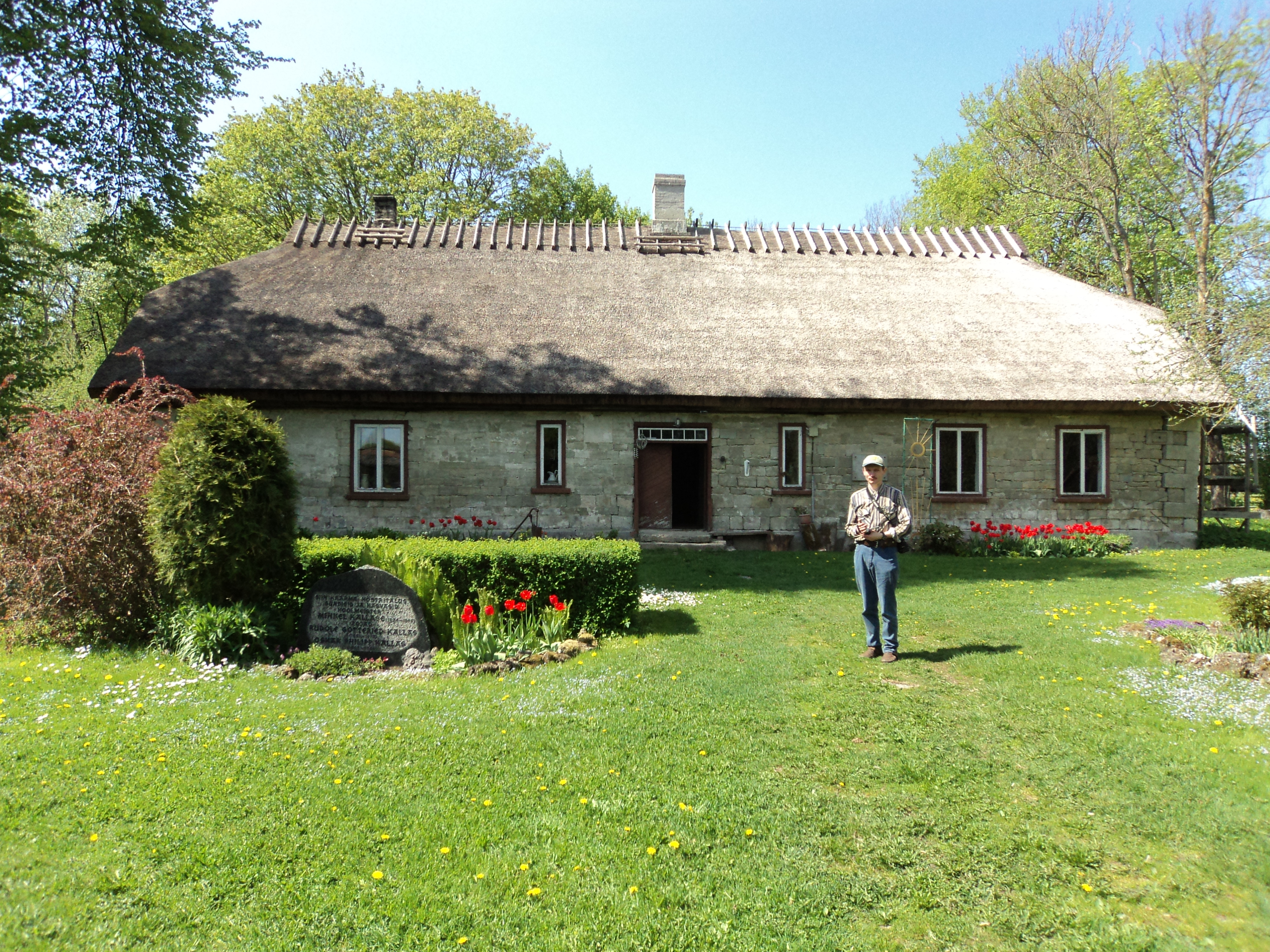 Kaarma koolimaja